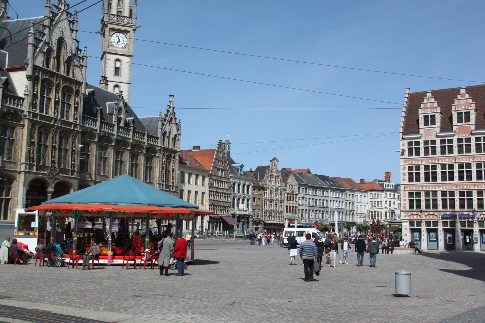 Ghent, Belgium on 2011-04-10